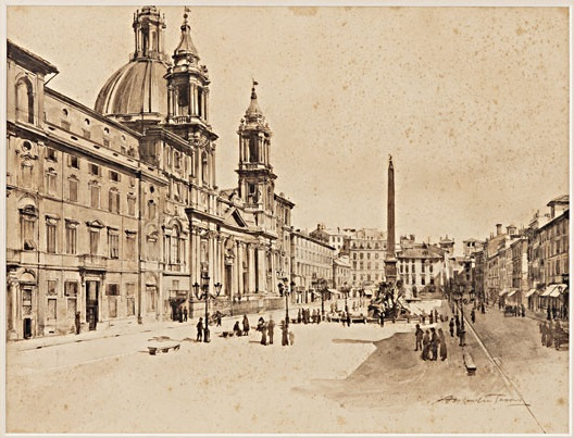 Piazza Navona a Roma, seppia, 26,5 x 20 cm, coll. privata